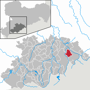 Zöblitz im Erzgebirgskreis, Sachsen